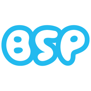 ブロードウェイスマートプロジェクトのロゴ画像修正